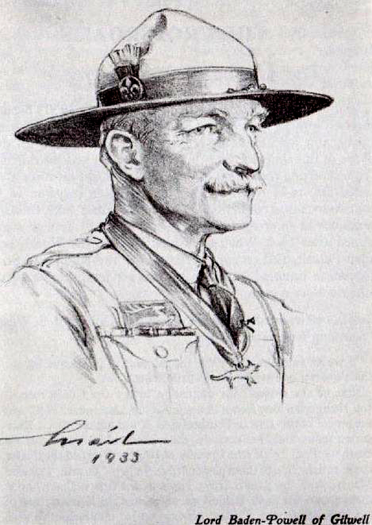 Robert Stephenson Smyth Baden-Powell, lord Baden-Powell (London, 1857. február 22. – Nyeri, Kenya, 1941. január 8.), monogramja után „Bi-Pi” a brit hadsereg altábornagya, író és a cserkészet megalapítója.